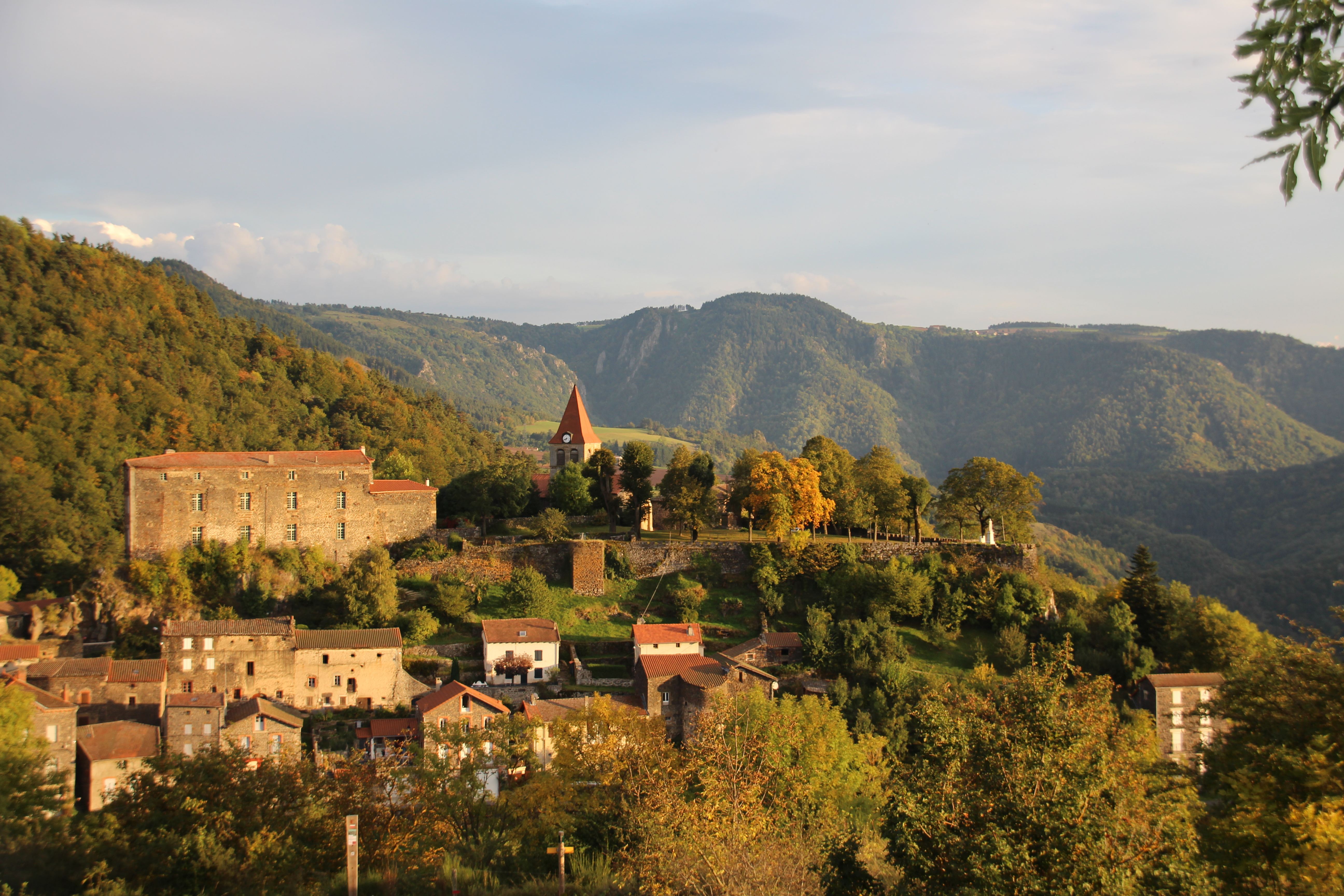 Saint-Privat-d'Allier vue sur le château et la vallée de l'Allier